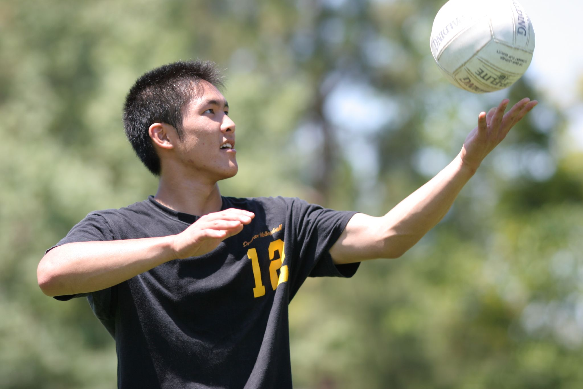 Volleyball serve